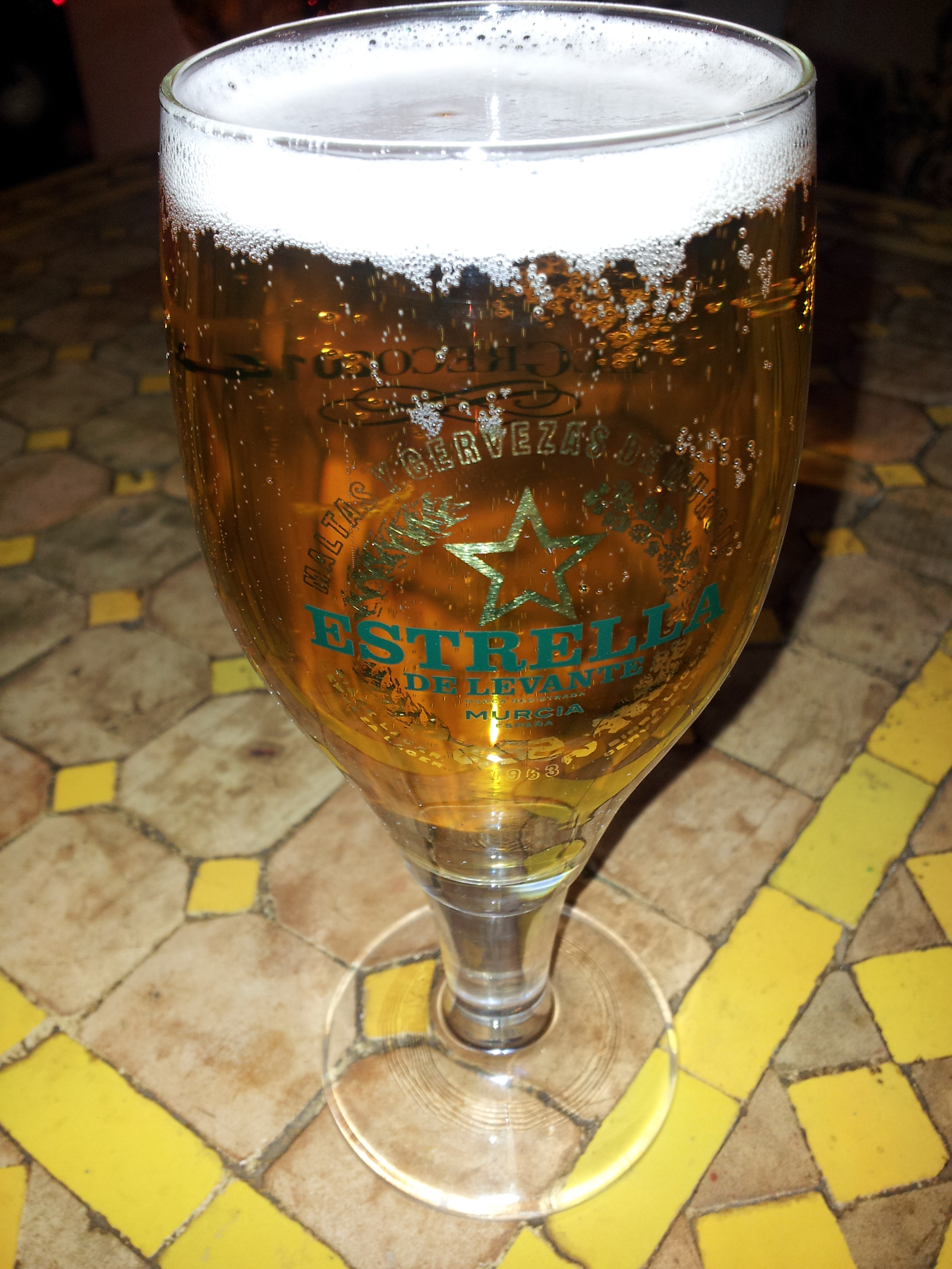 Una canya.